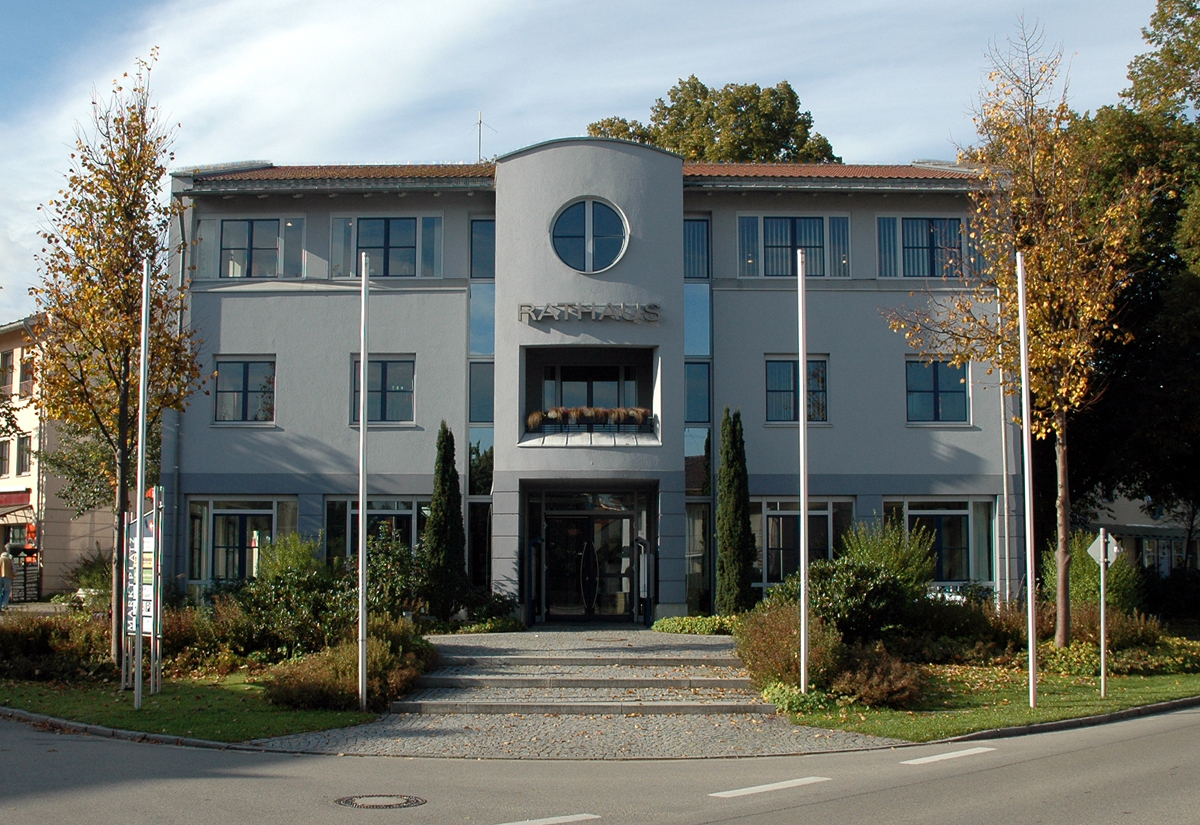 Das Rathaus in Schwabhausen